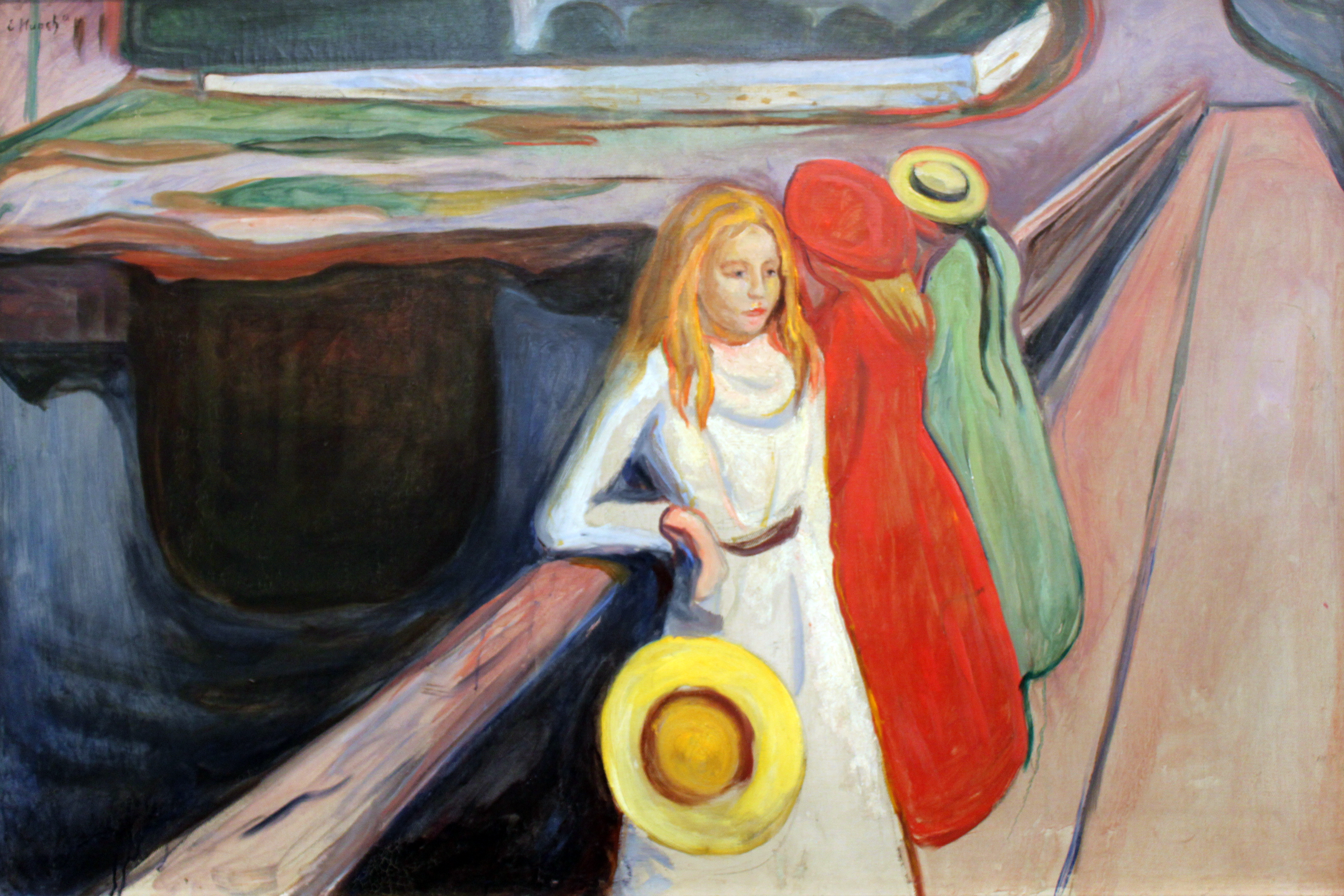 Gerd Woll: Edvard Munch - complete paintings : catalogue raisonné. Nr. 484. 16 bit Version: File:Munch-MädchenAuf-DerBrücke.tif